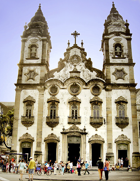 Fachada da Matriz de Santo Antônio, Recife, Pernambuco, Brasil.